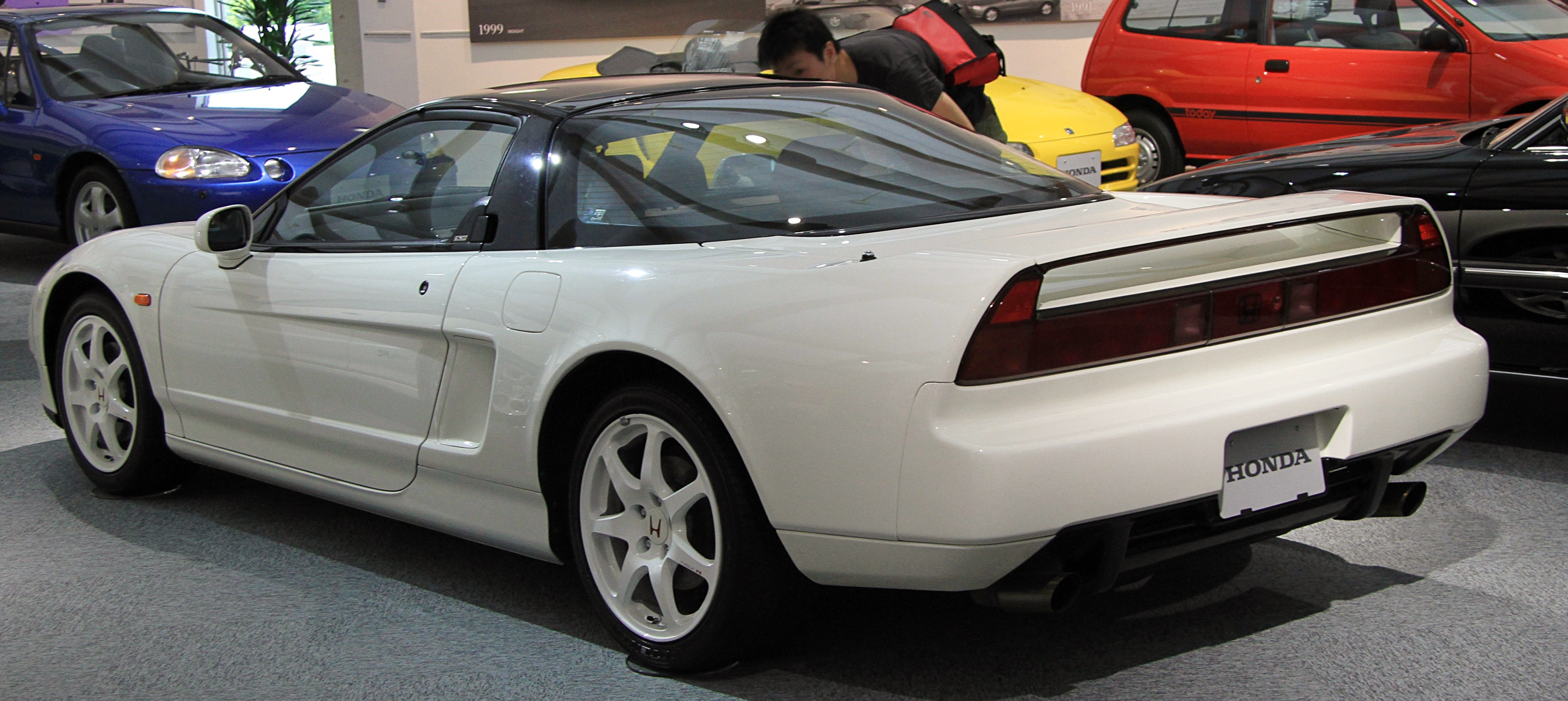 Honda NSX Type R